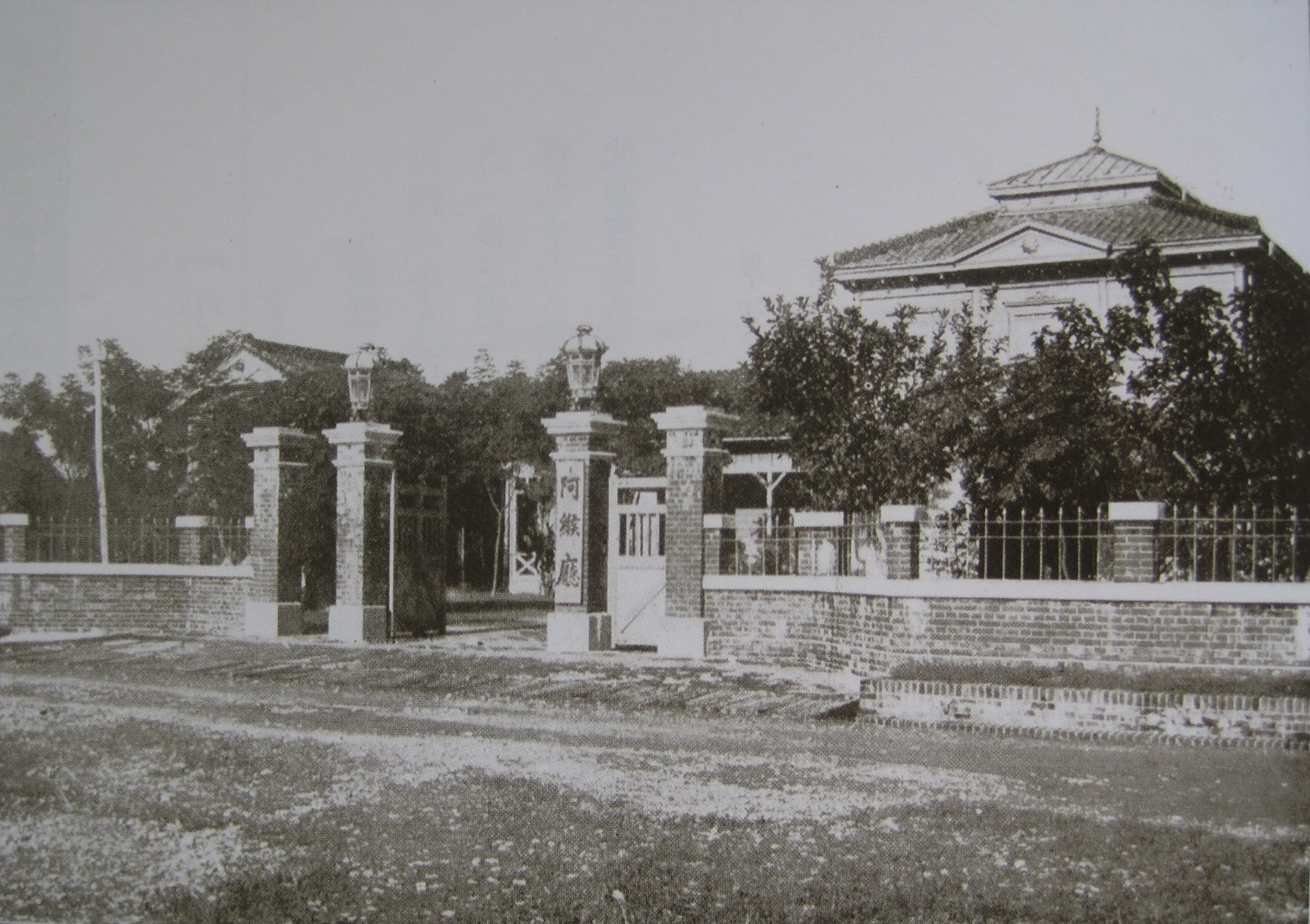 日治時期阿緱廳舍